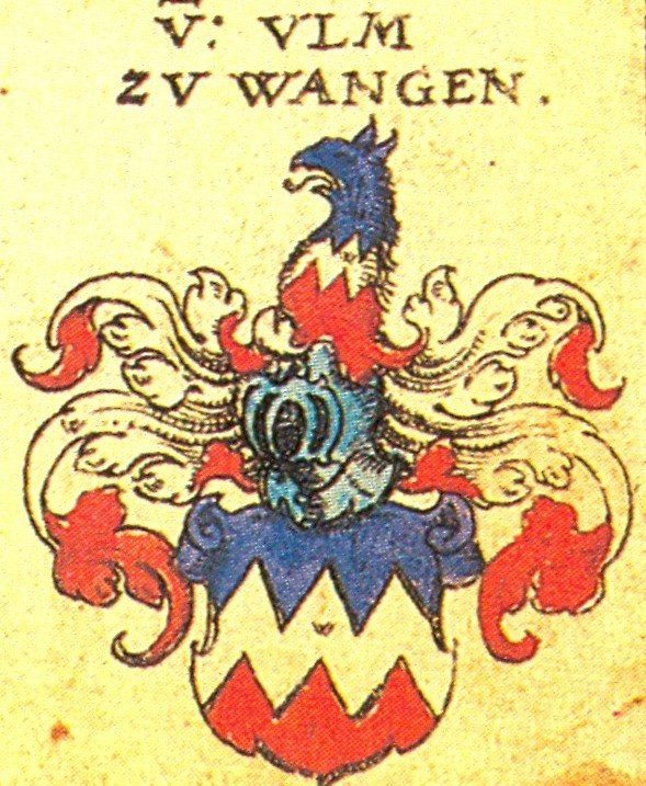 Wappen des schwäbischen Adelsgeschlechts Ulm zu Wangen